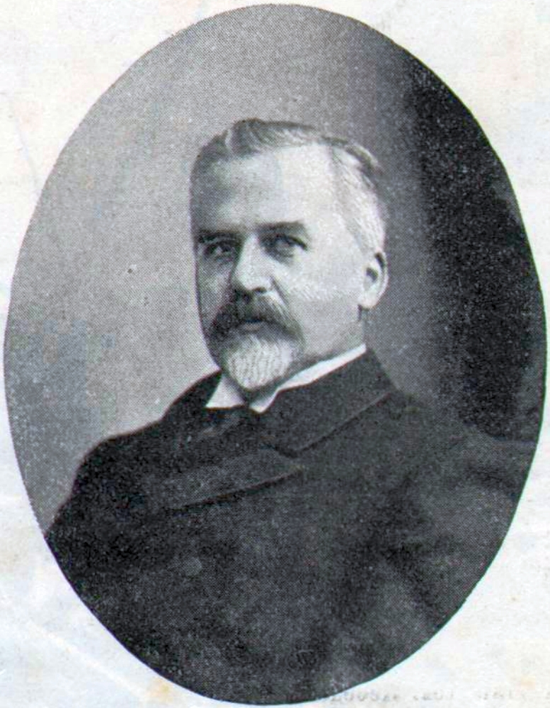 Манухин Сергей Сергеевич